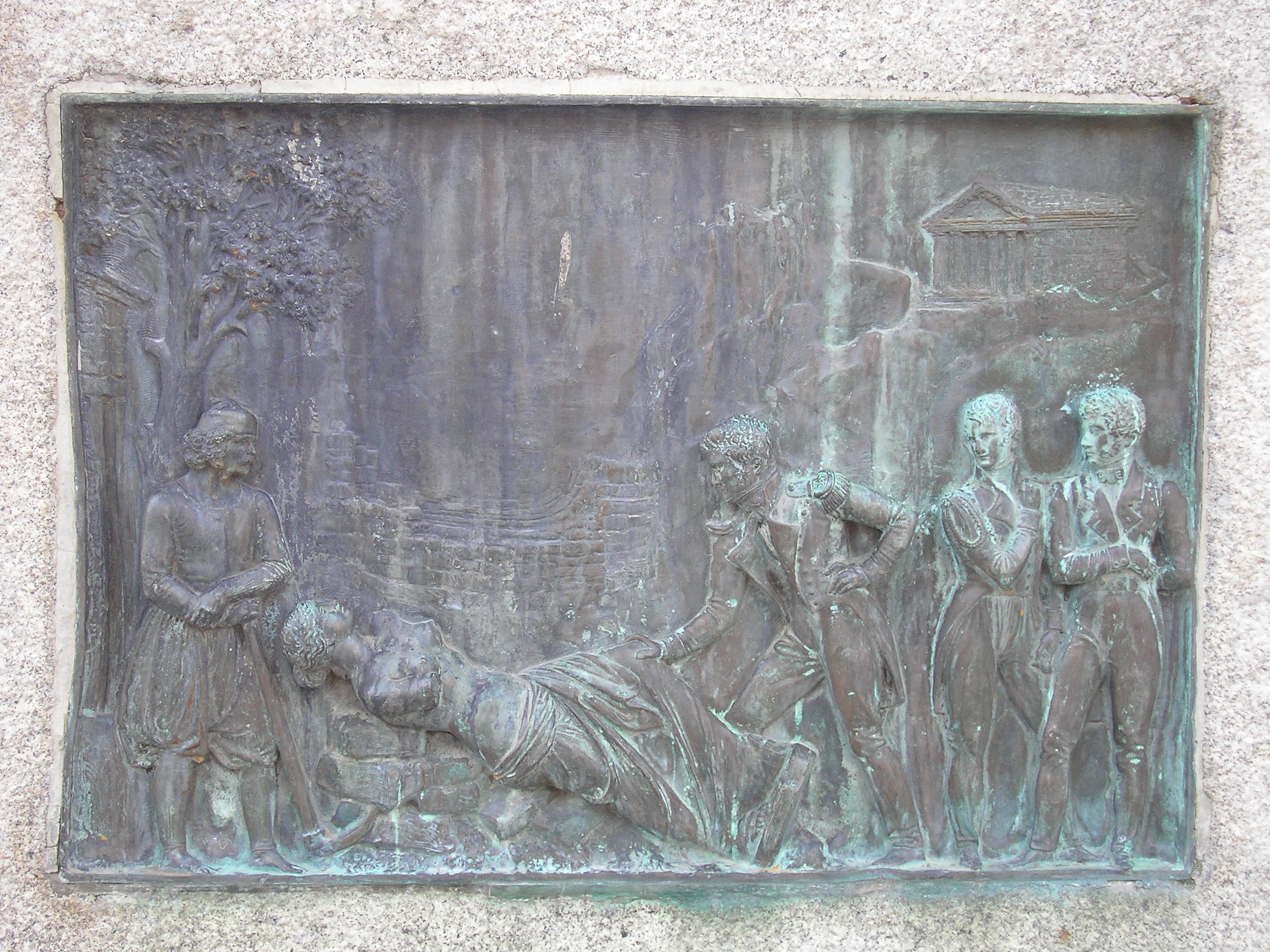 Condé-sur-Noireau (Normandie, France). Un des quatre bas-reliefs en bronze (1844) représentant la vie de Dumont d'Urville par Dominique Molknecht : découverte de la Vénus de Milo.